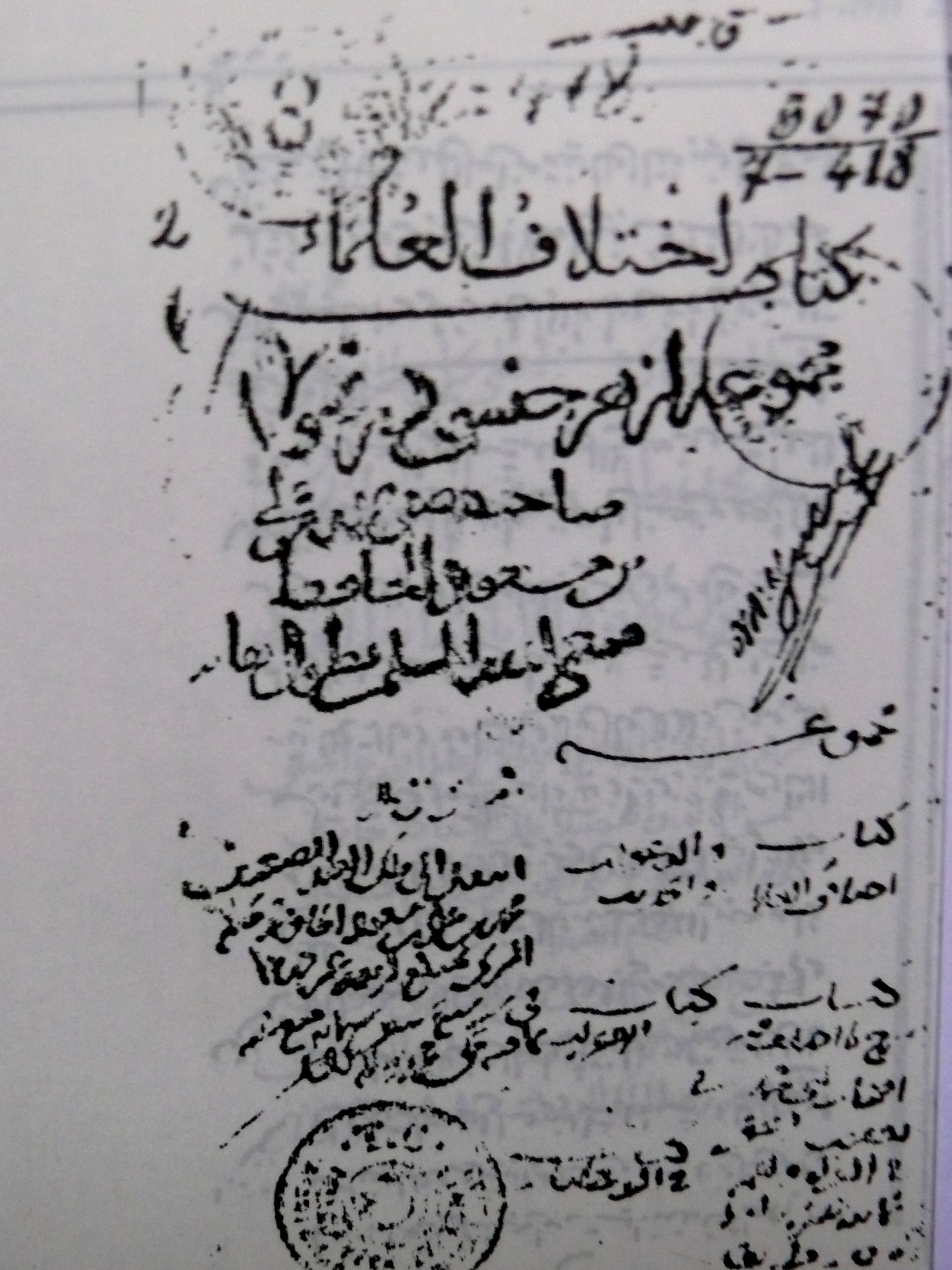 Reproduktion des Titelblattes einer arabischen Handschrift aus dem Jahr 1251